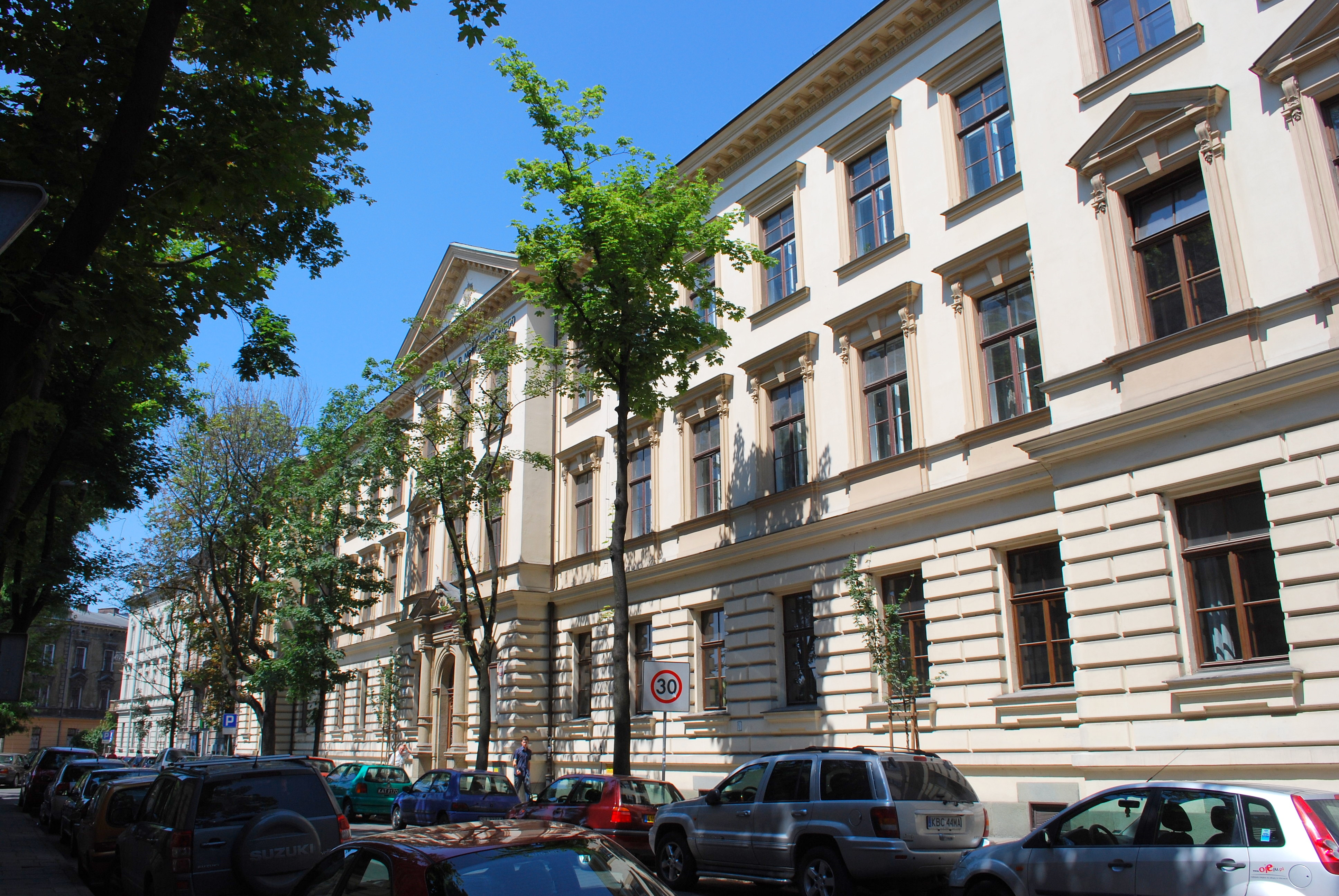 I Liceum Ogólnokształcące im. Bartłomieja Nowodworskiego w Krakowie